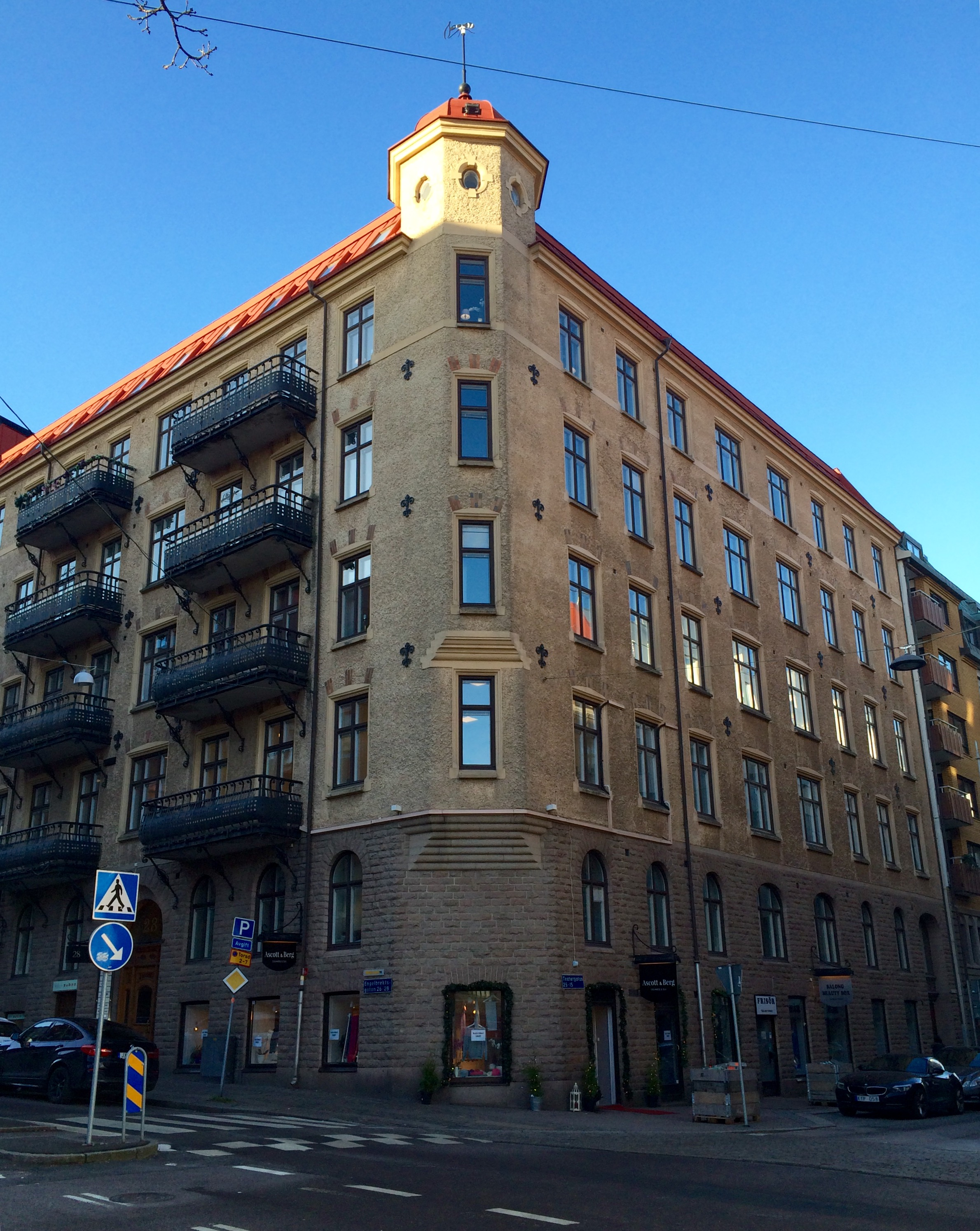 Wallenstamägda hörnhuset med fastighetsbeteckning Lorensberg 58:6 vid Engelbrektsgatan 28 / Teatergatan 25. Ovanför gatunamnsskylten sitter en Wallenstamskylt och ovanpå tornspiran syns Wallenstams logo.